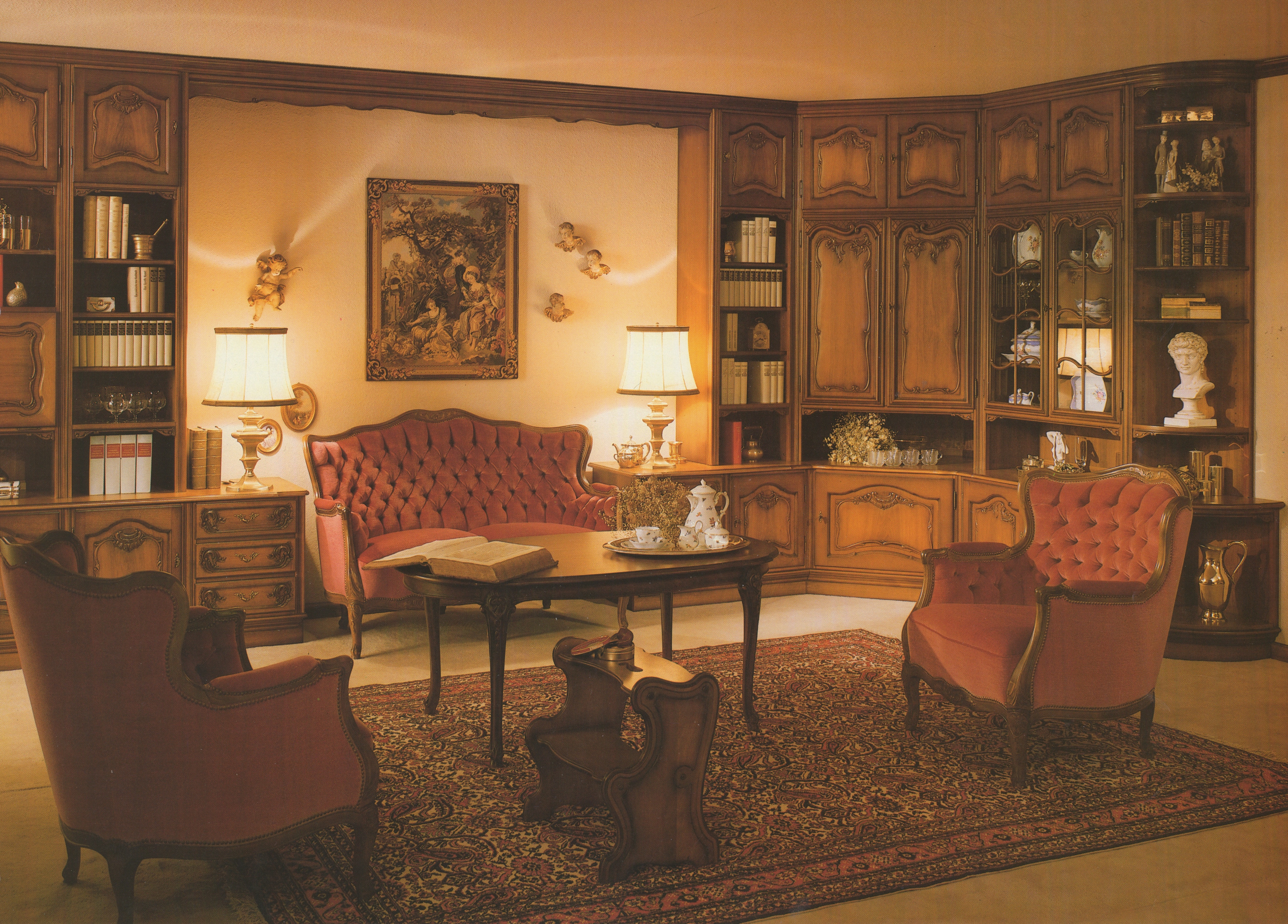 Katalogabbildung 1980, Wohnzimmer mit Schrankwandgruppe und Polstergarnitur Einrichtungsbeispiel 200: Schrankwandgruppe „Hoff 83“ mit Sofanische und Ecklösung, Polstergarnitur „Lüttich“, Coutisch „Velbert“, Stufenbank „Stolberg“ in Aachen-Lütticher Barock; Stilmöbelfabrik Anton Spilker, Steinheim (Westfalen)